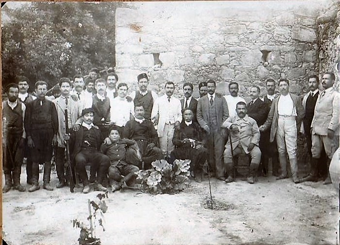 Αυτός που κρατά το κυνηγετικό όπλο είναι ο δημοδιδάσκαλος Κ/νος Κωνσταντινίδης.